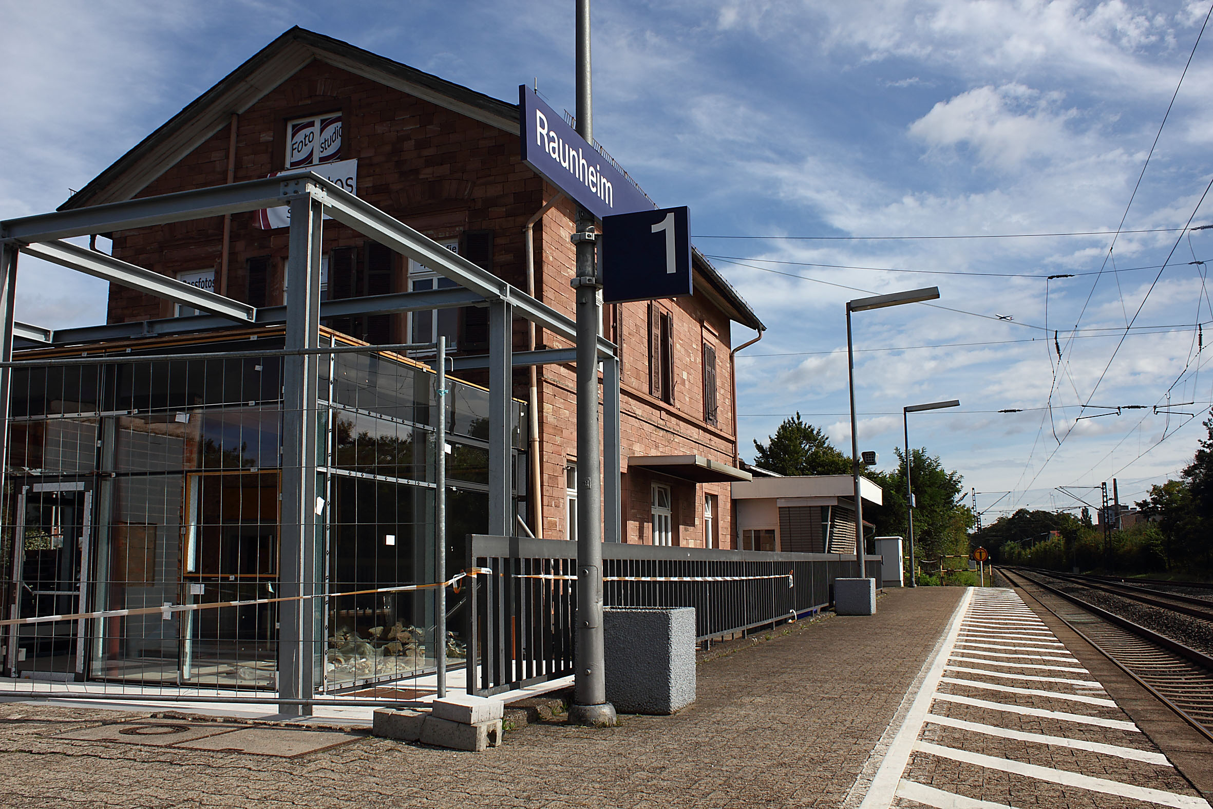 Blick auf das historische Empfangsgebäude des Raunheimer Bahnhofs und Schienennetz in Richtung Frankfurt. Im Vordergrund der im Bau befindliche Anbau.